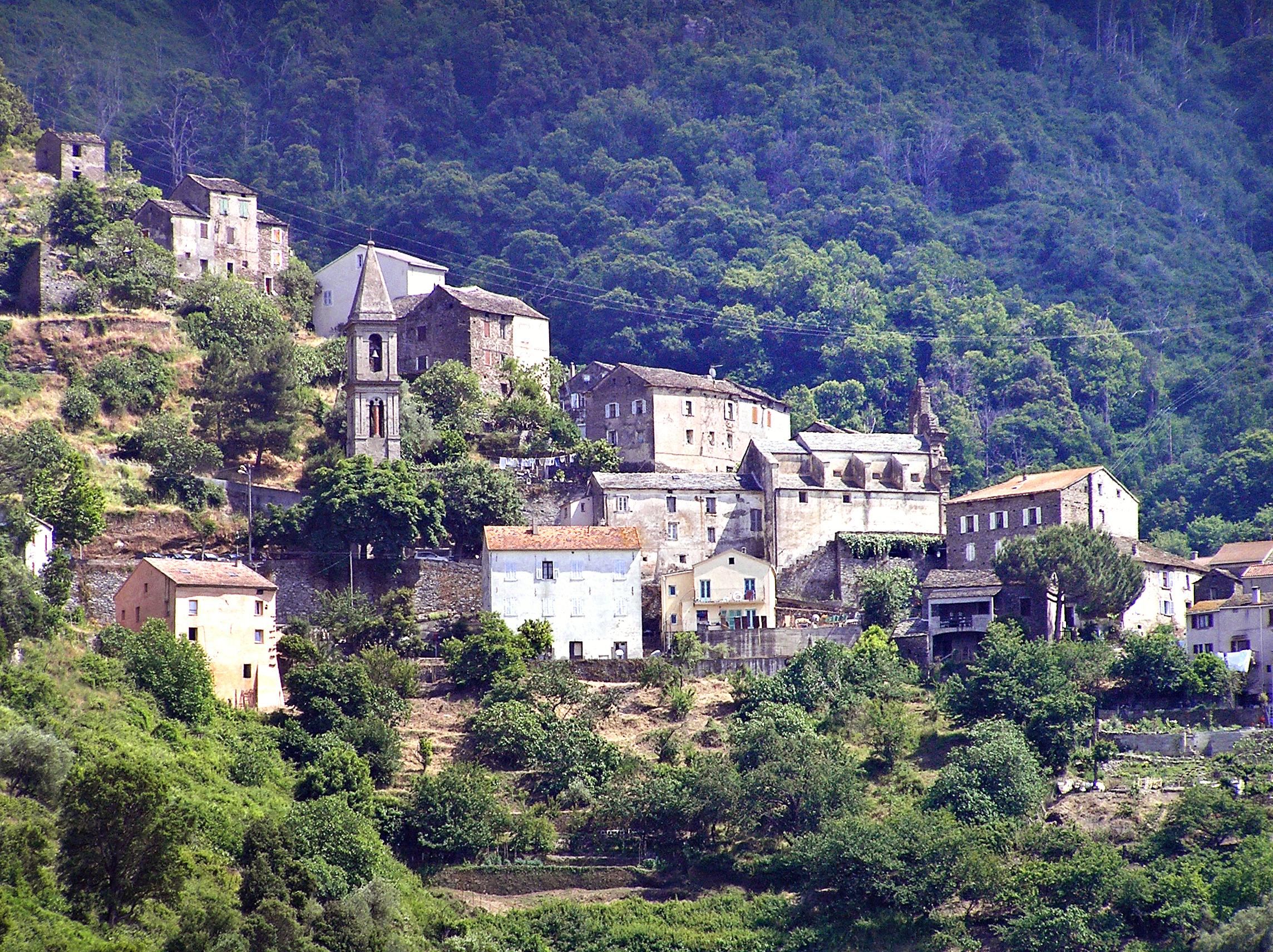 Prunelli-di-Casacconi (Corse) - Vue du village